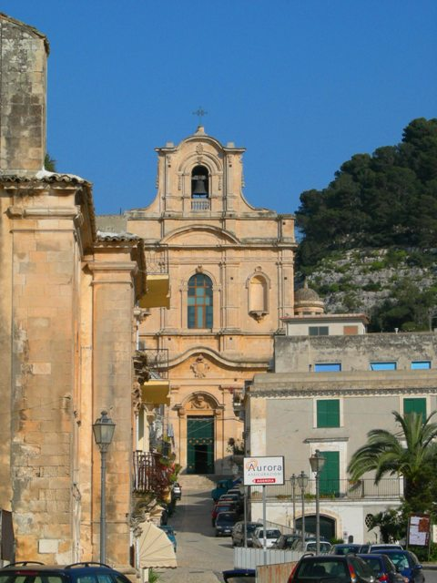 Autore: Claudio Zisa Descrizione: Prospetto del Santuario di Santa Maria La Nova a Scicli (RG) Licenza: Pubblico Dominio